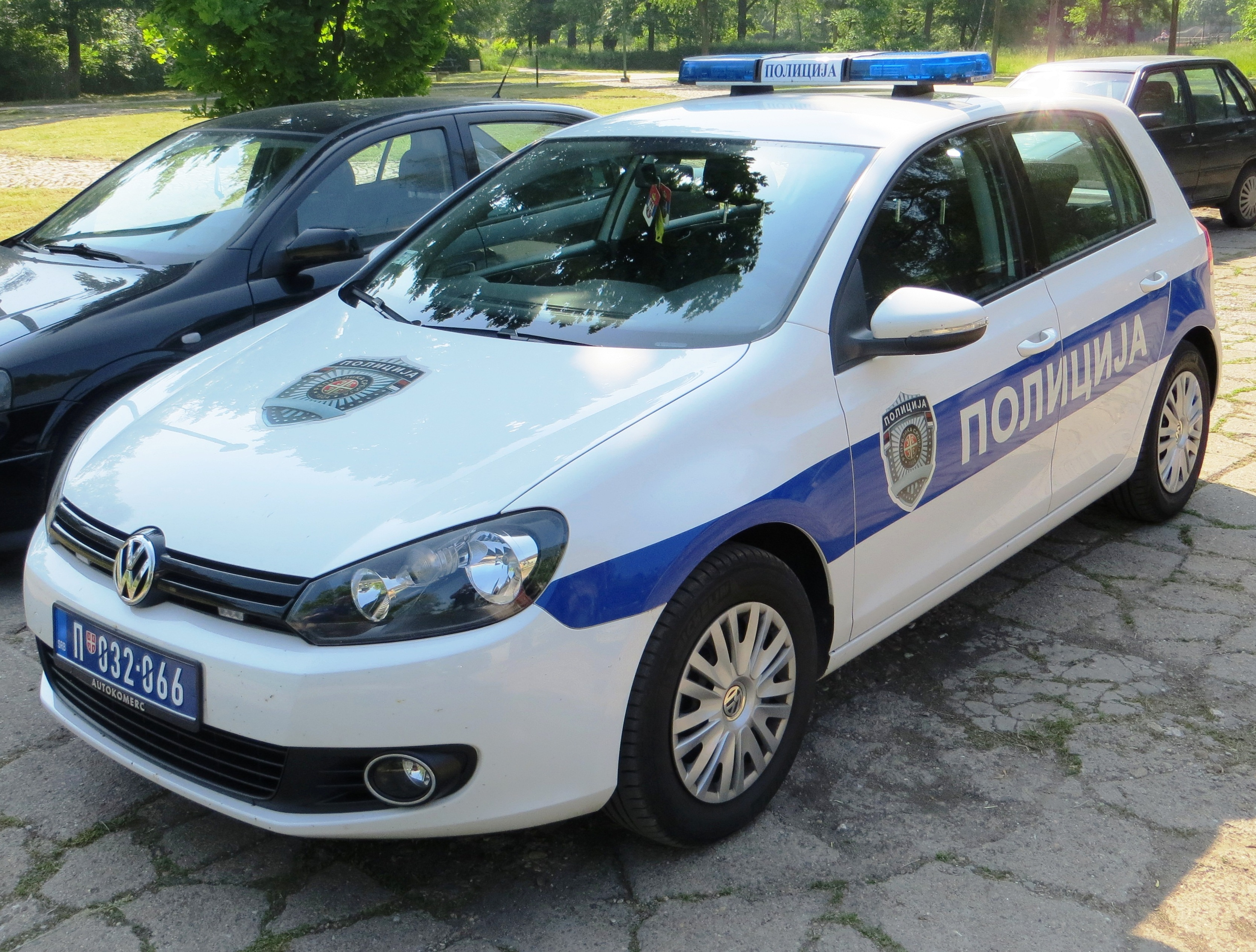 Politieauto uit Servië